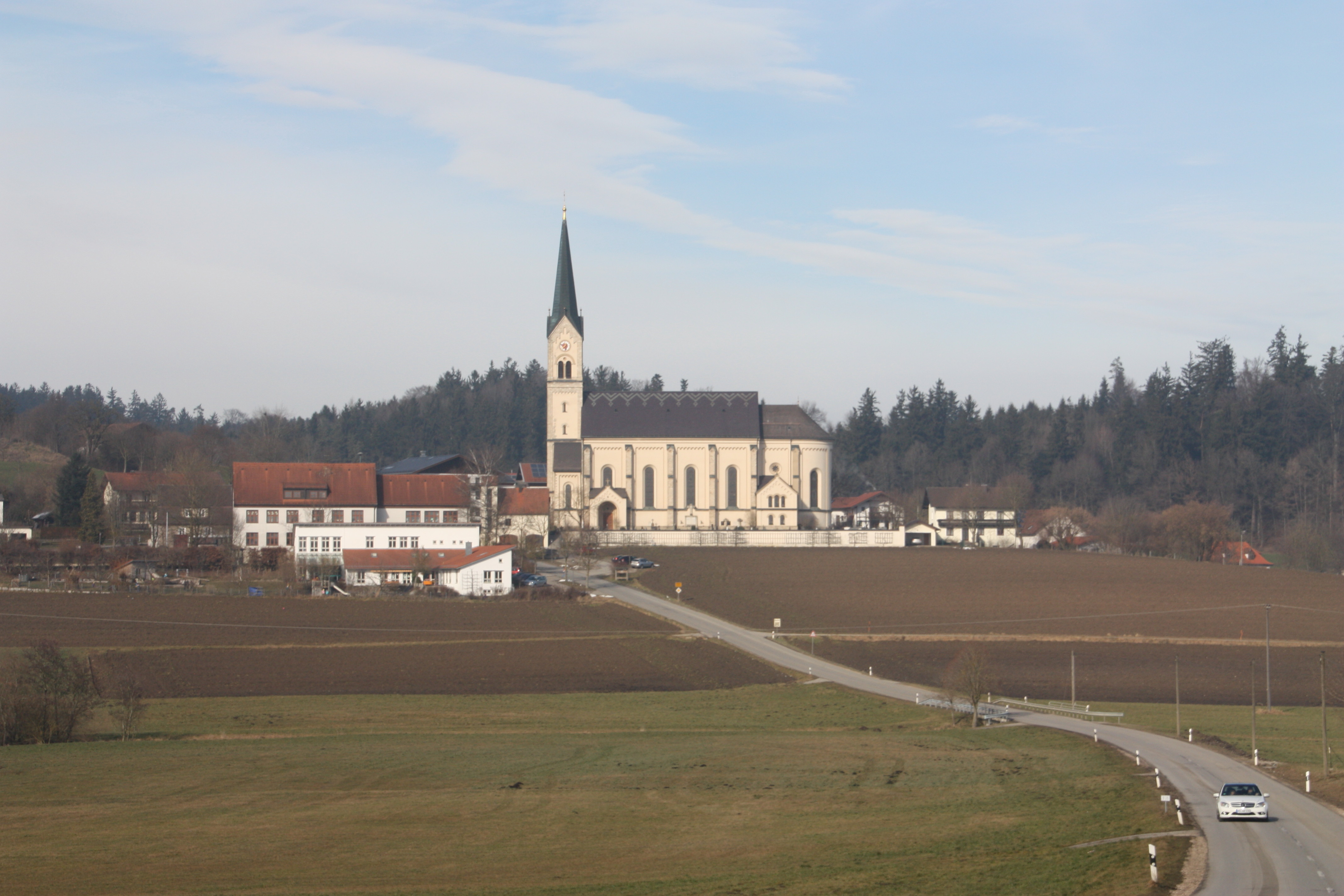 Halsbach